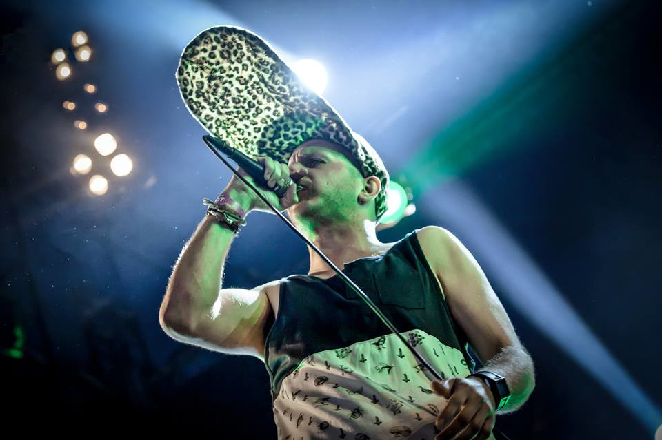 Jack Parow live op Zwarte Cross 2015 met zijn bekende pet met lange klep